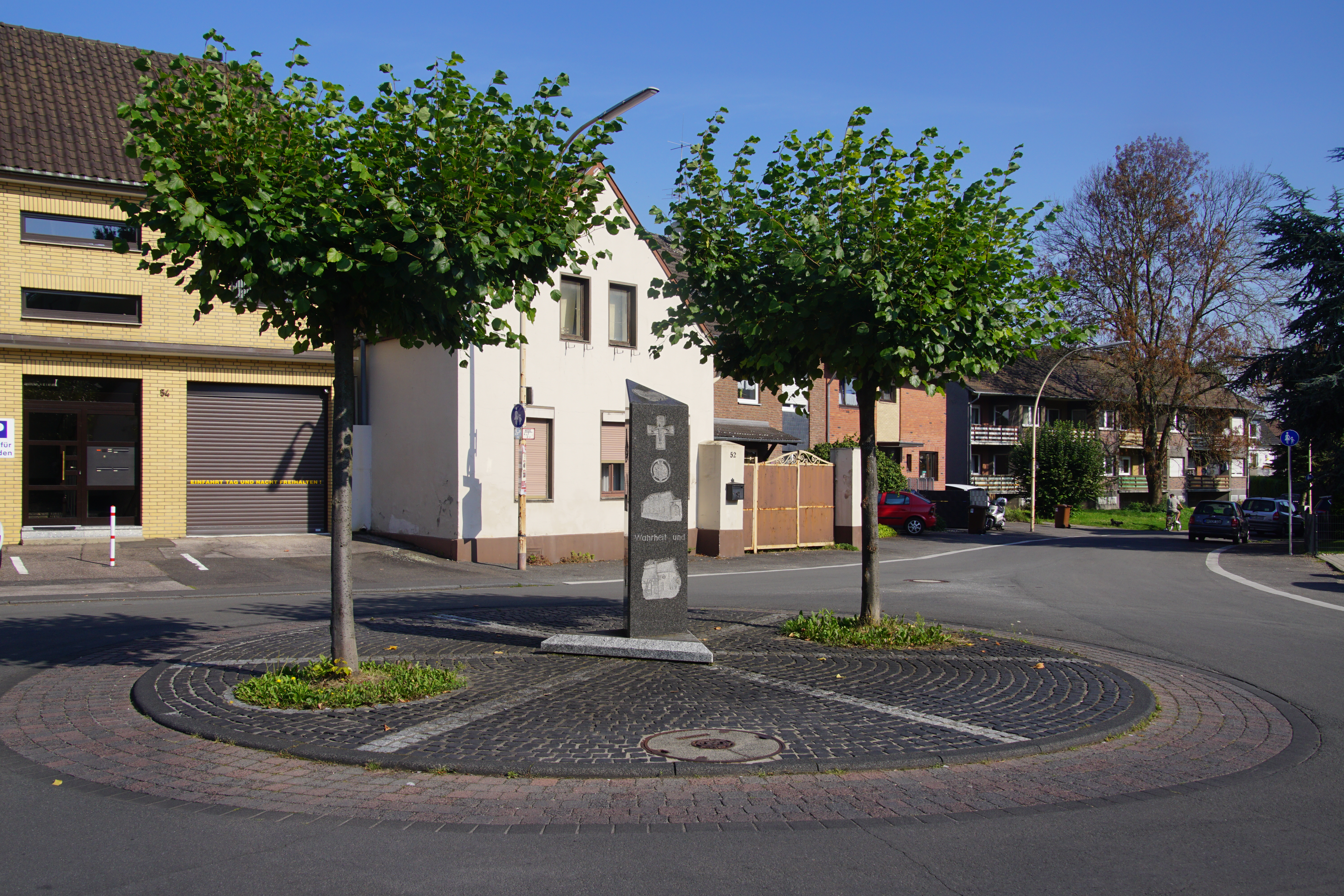 2008 eingeweihte Stele ("Wahrheit und Recht ist des Bürgers Pflicht") im Kreisverkehr von-Geyr-Ring Burbach